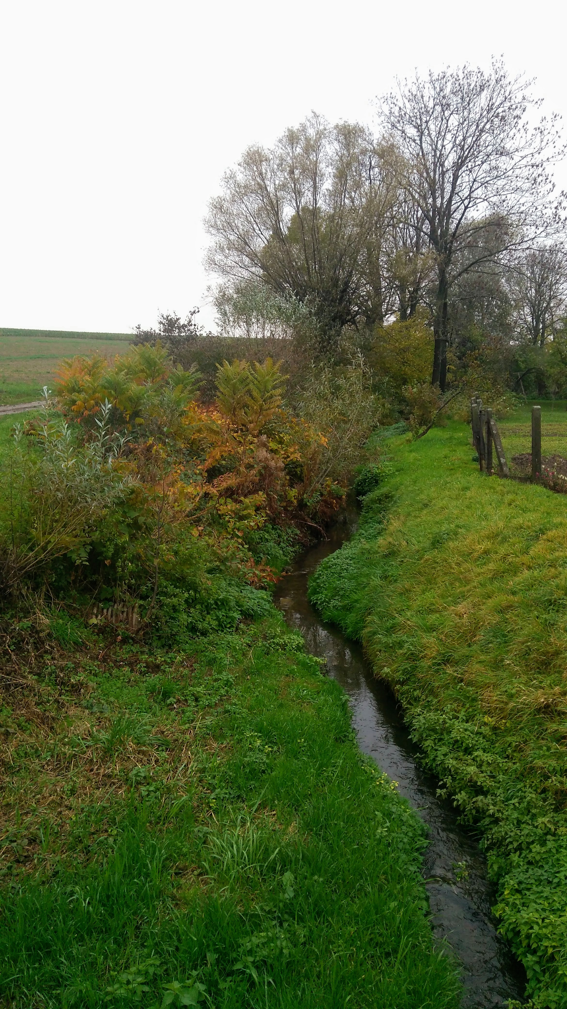 To Libosvárky v Loukově